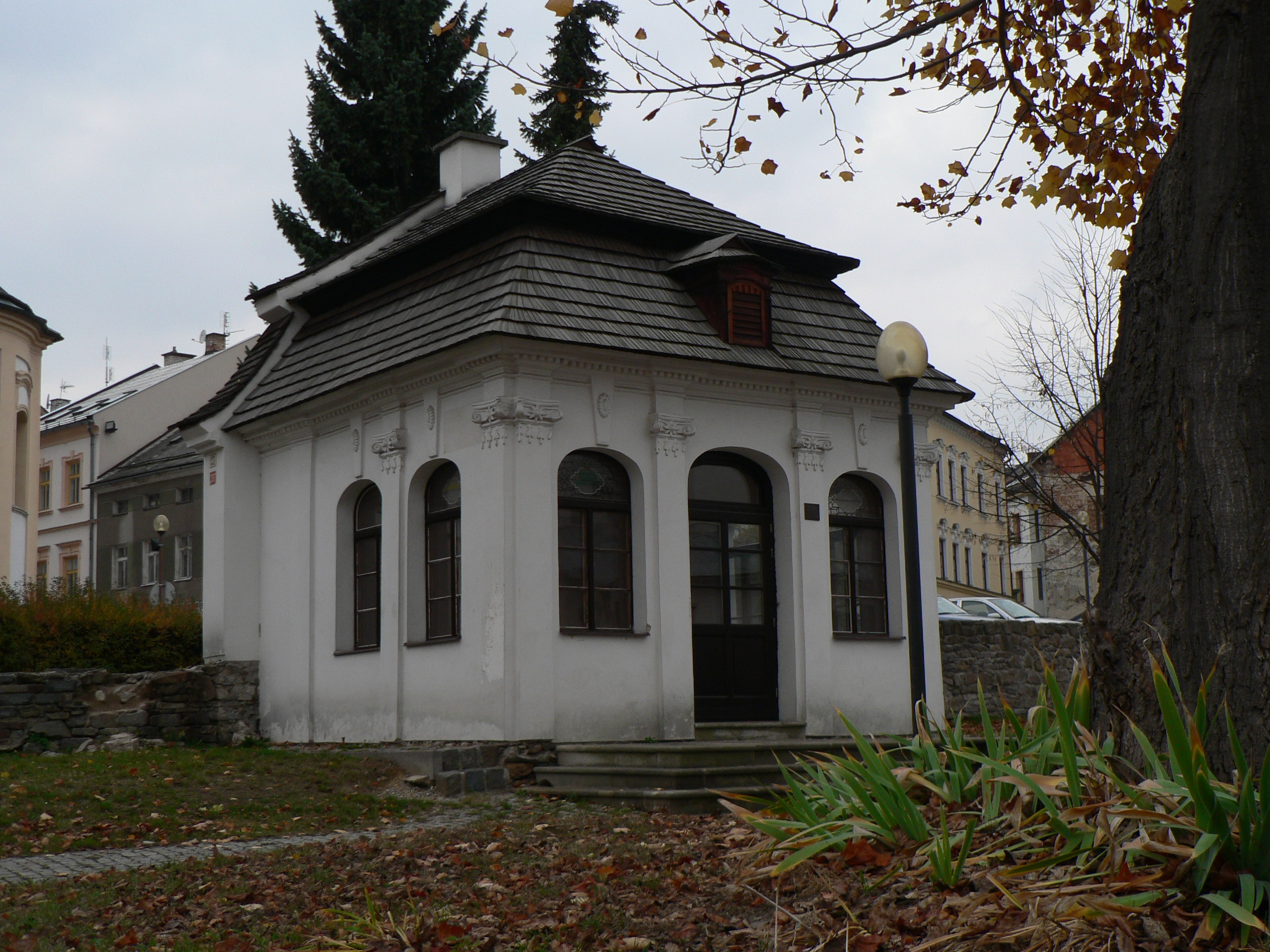 Klasicistní zahradní pavilónek z konce 18. století (Šumperk).